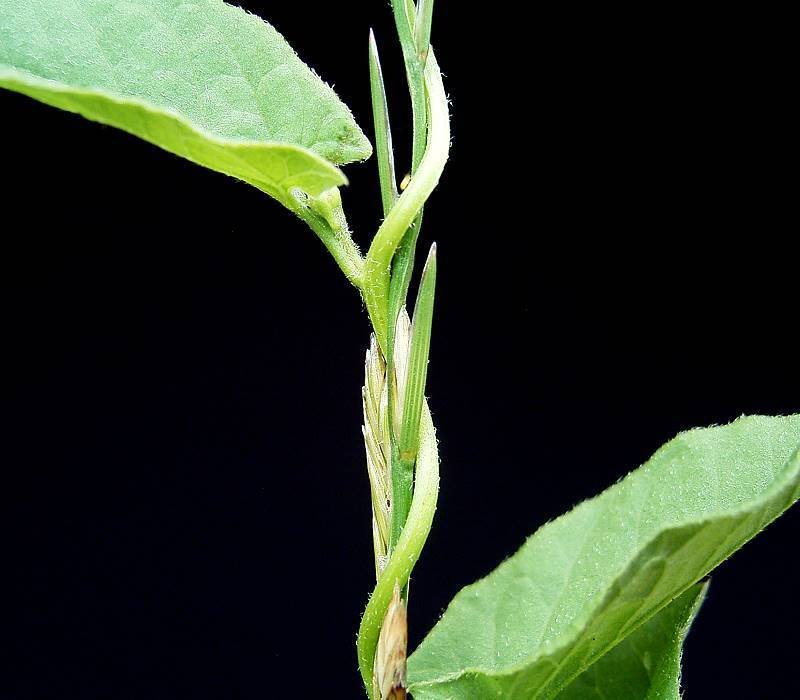 Convolvulus arvensis tendril